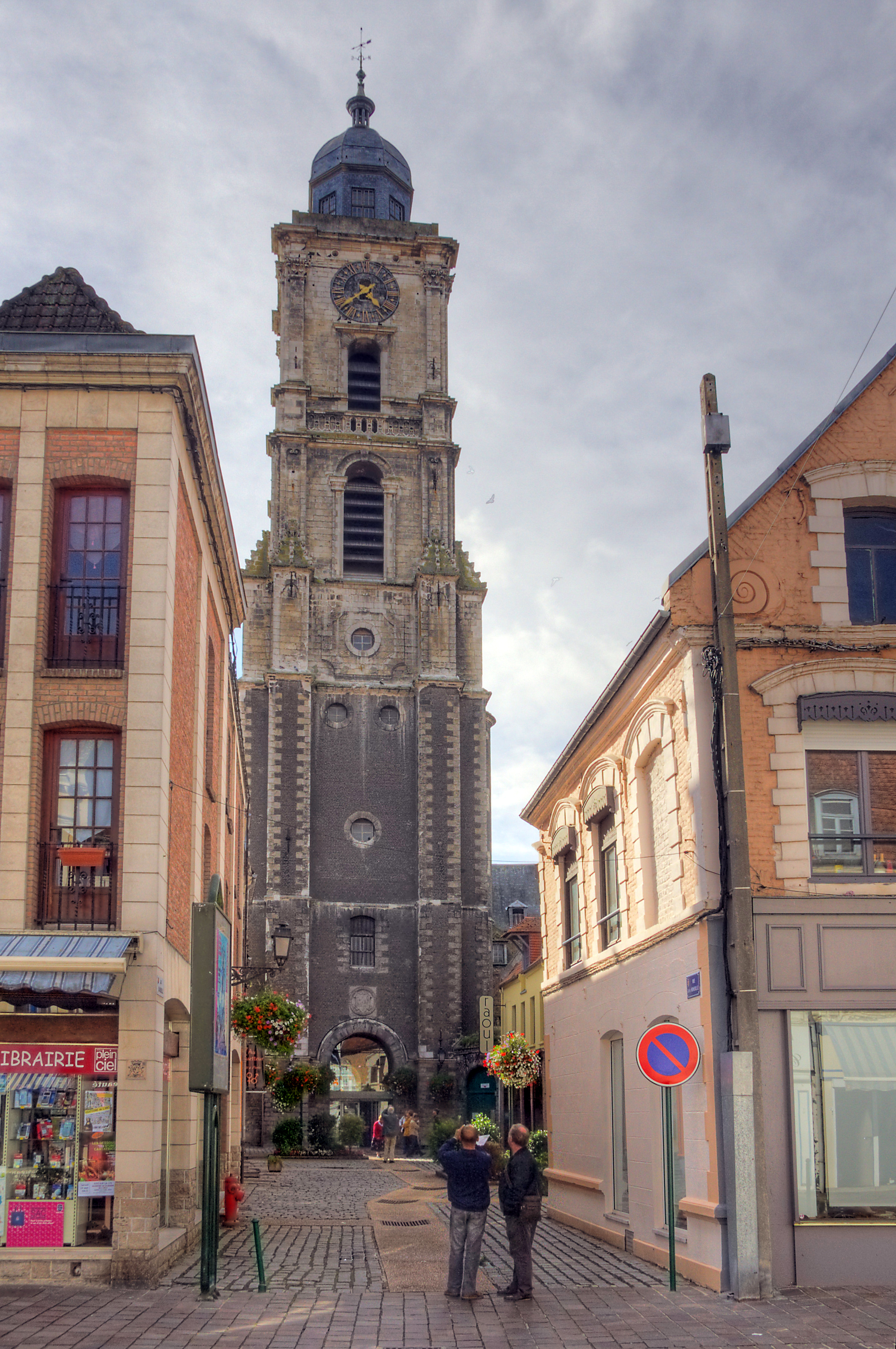 Aire sur la Lys le beffroi .